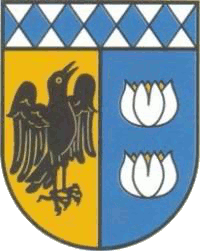 Wappen von Franking, Oberösterreich